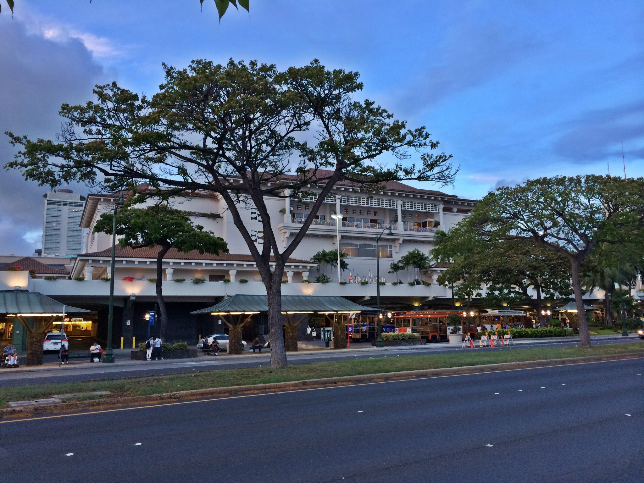 Neiman Marcus Store at Ala Moana